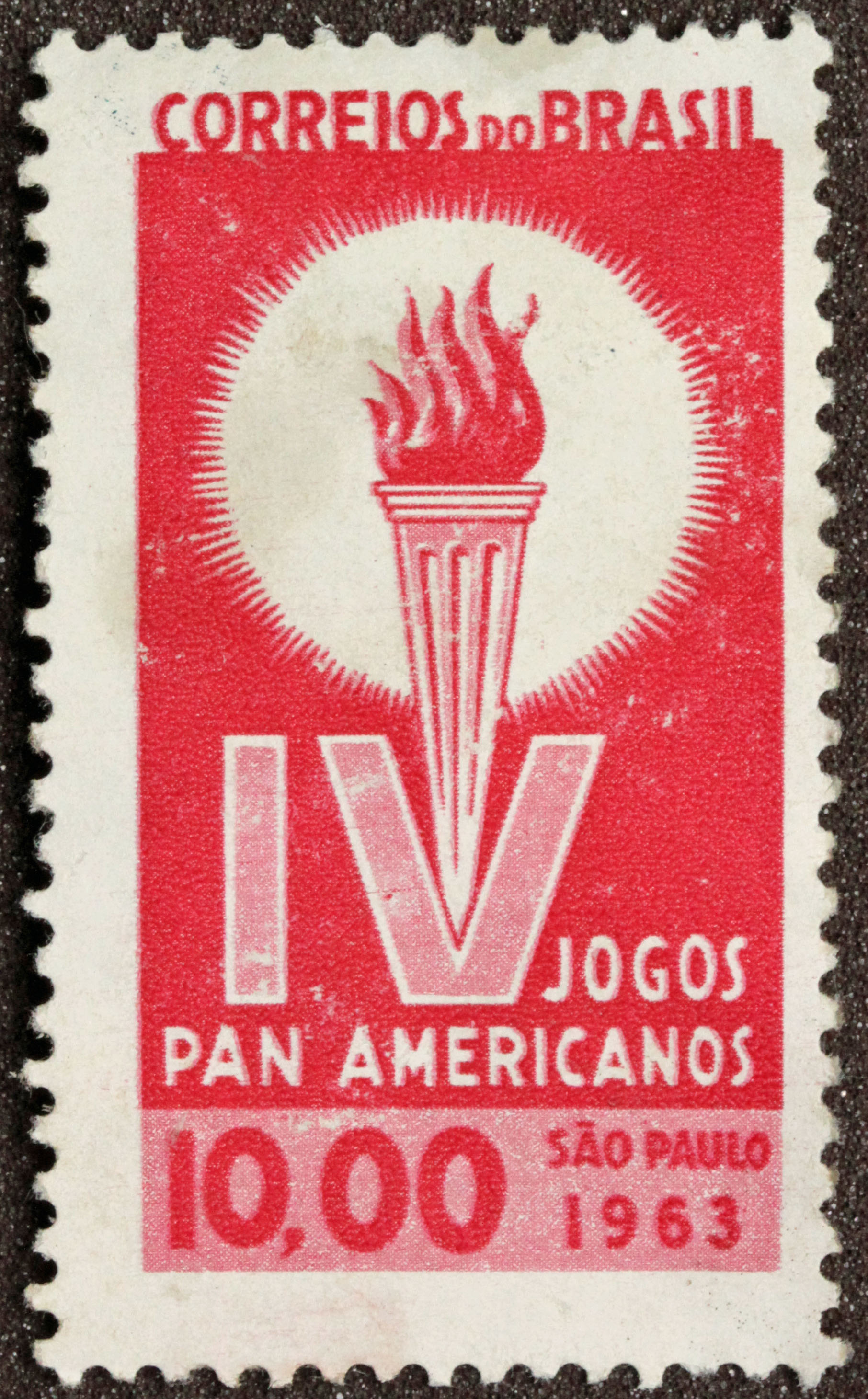 Selo Comemorativo do IV Jogos Pan Americanos - São Paulo - 1963 - Vermelho - Valor: 10,00